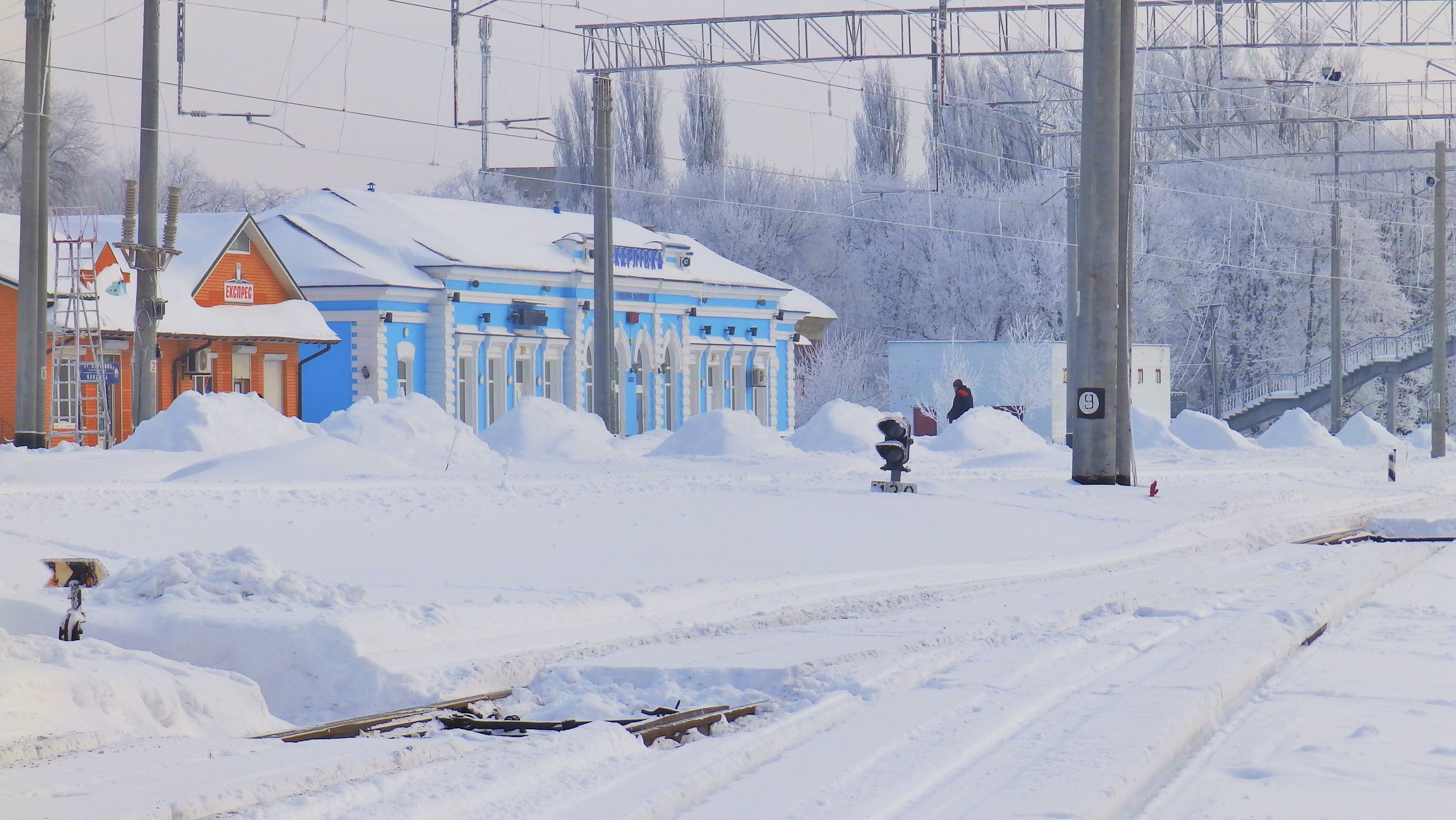 Karlivka, Poltavs'ka oblast, Ukraine